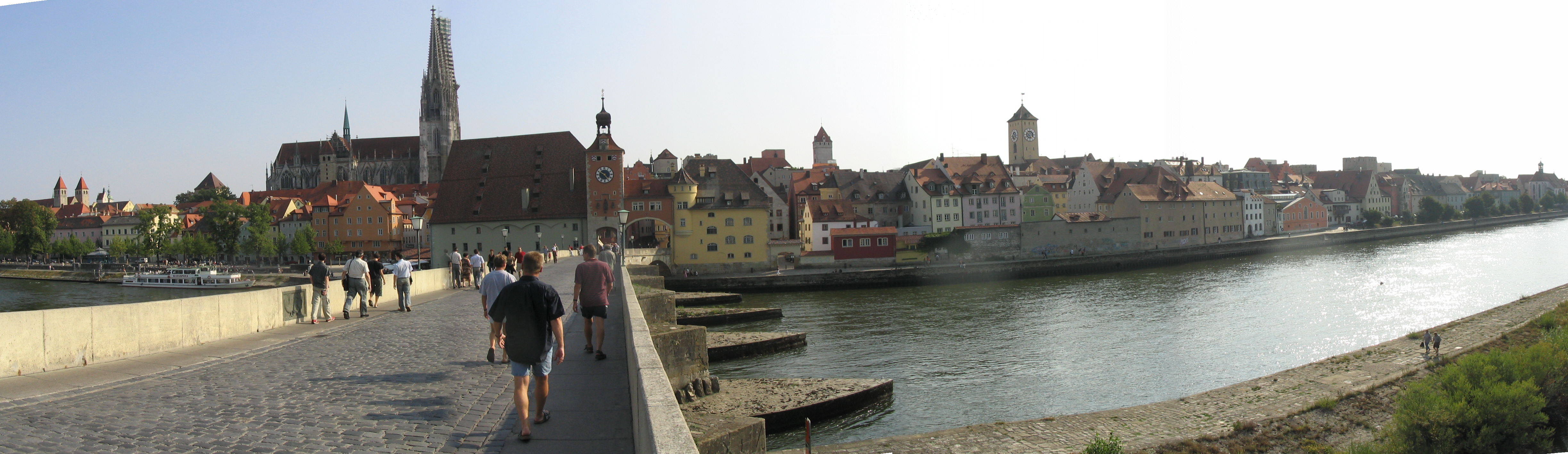 Regensburger Donaupanorama